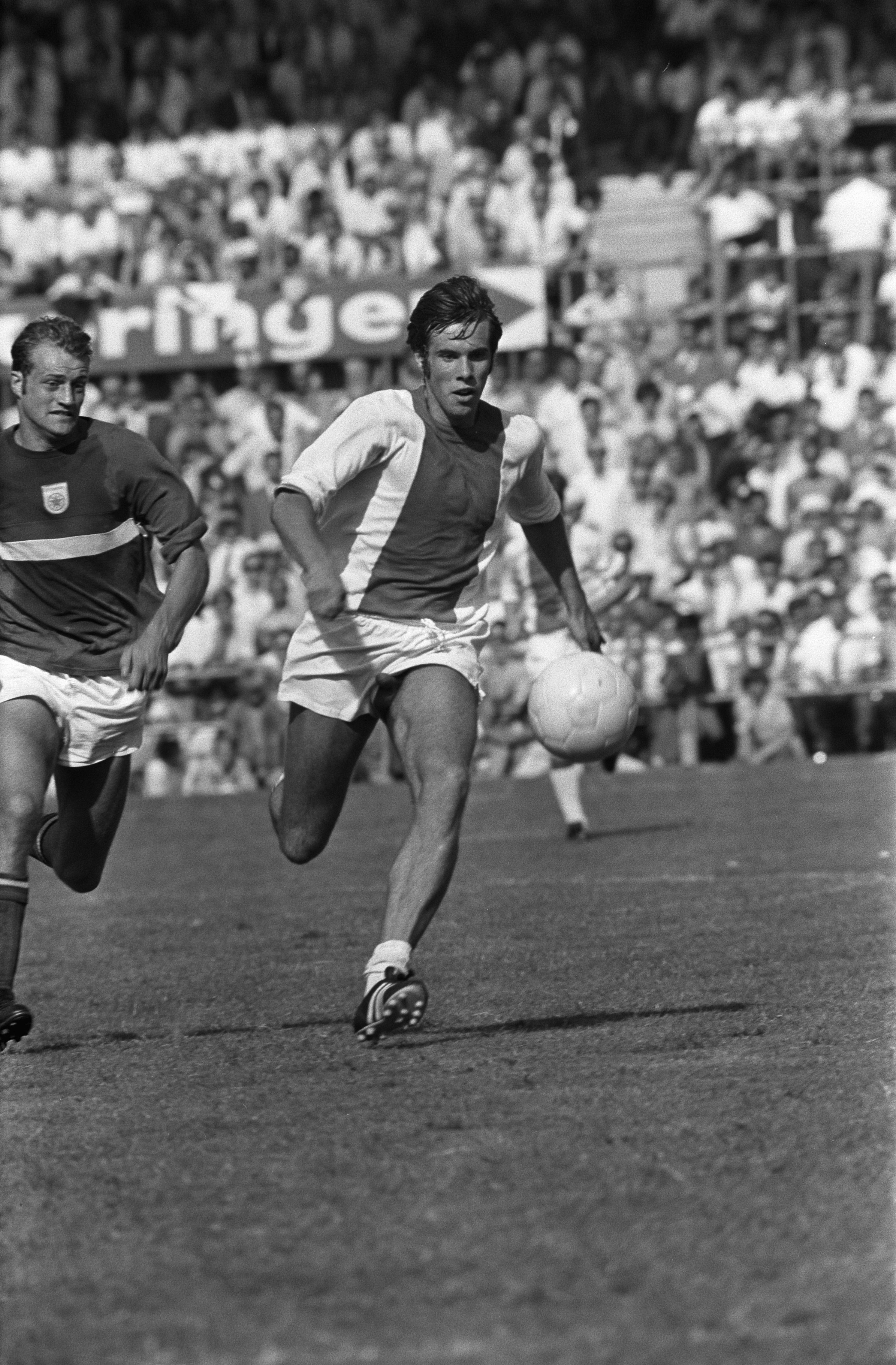 Match de football GVAV - Ajax (1-3), Dick van Dijk (au centre) en action. Photographie par Eric Koch / Anefo.